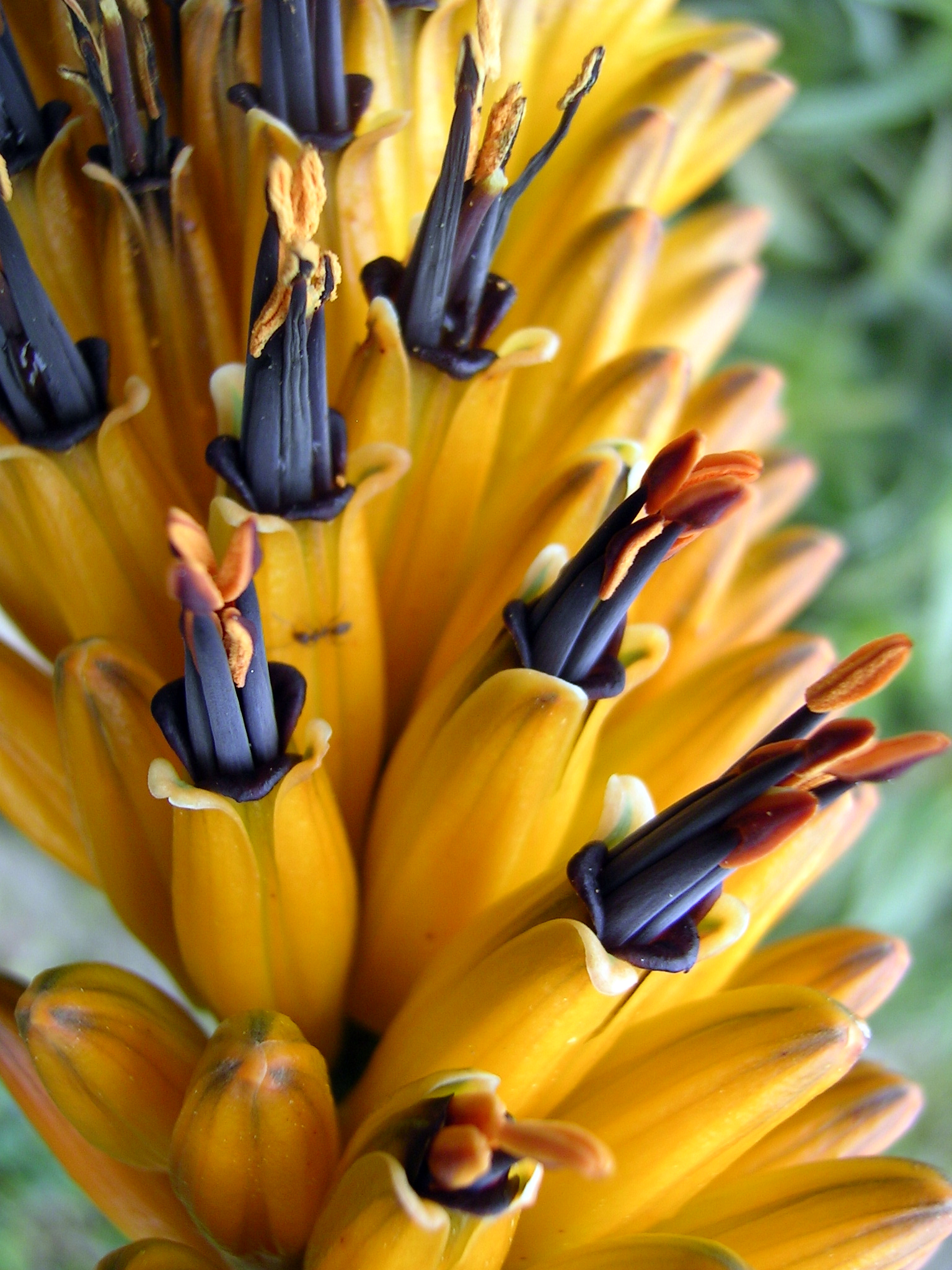 Aloe marlothii, Familia Aspodelaceae, flor